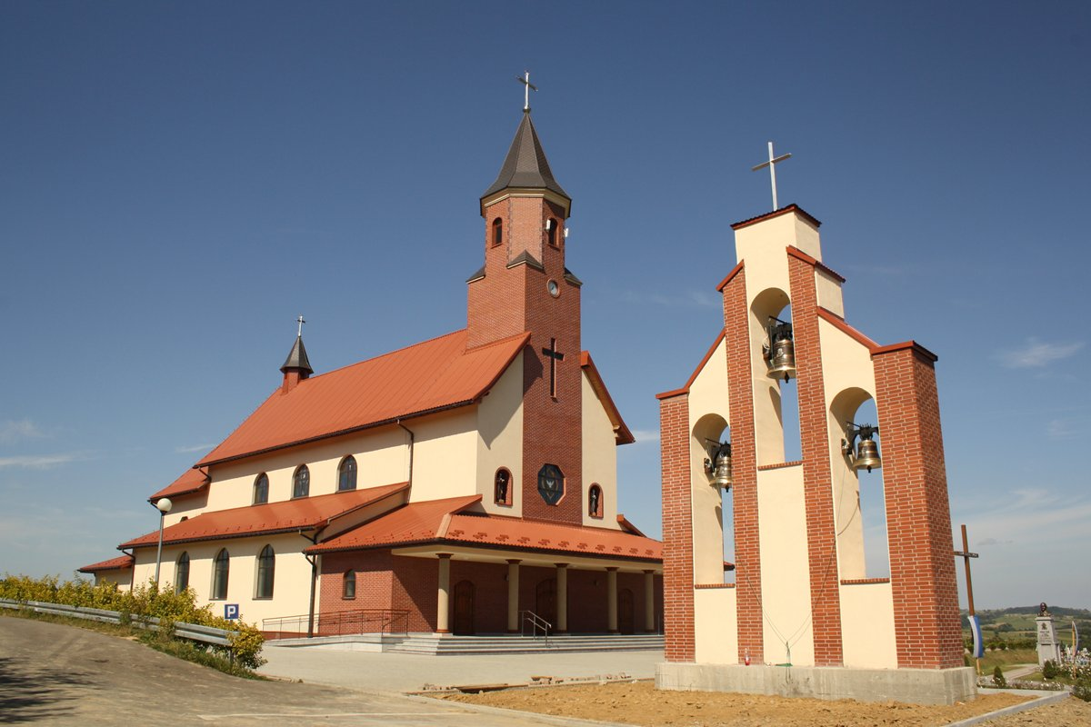 Nowy kościół Czaszyn